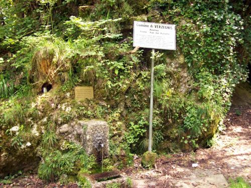 Verzegnis (UD), fonte aga dal paradis